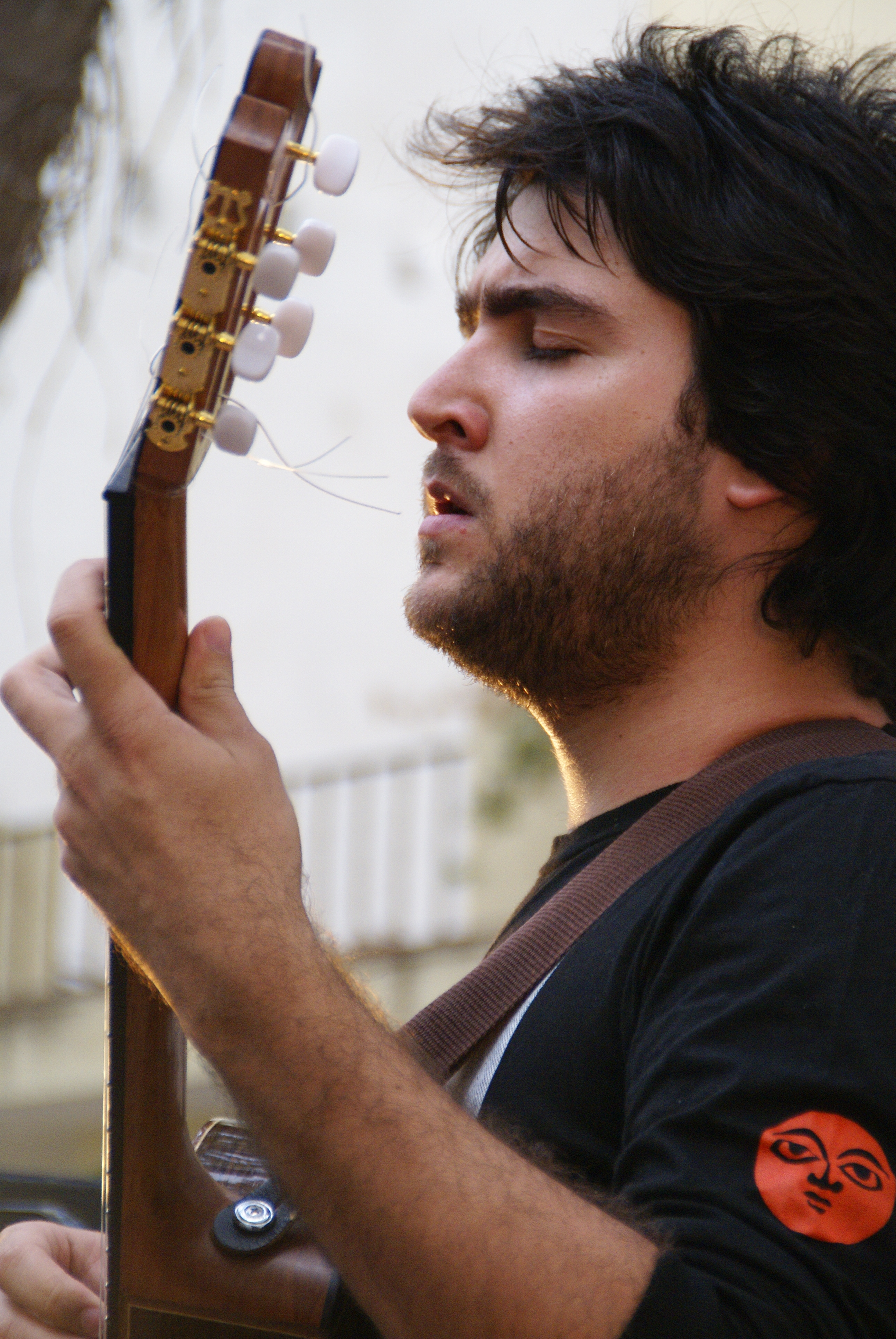 El guitarrista, compositor e intérprete argentino dando un concierto en 2011 en Cuba.